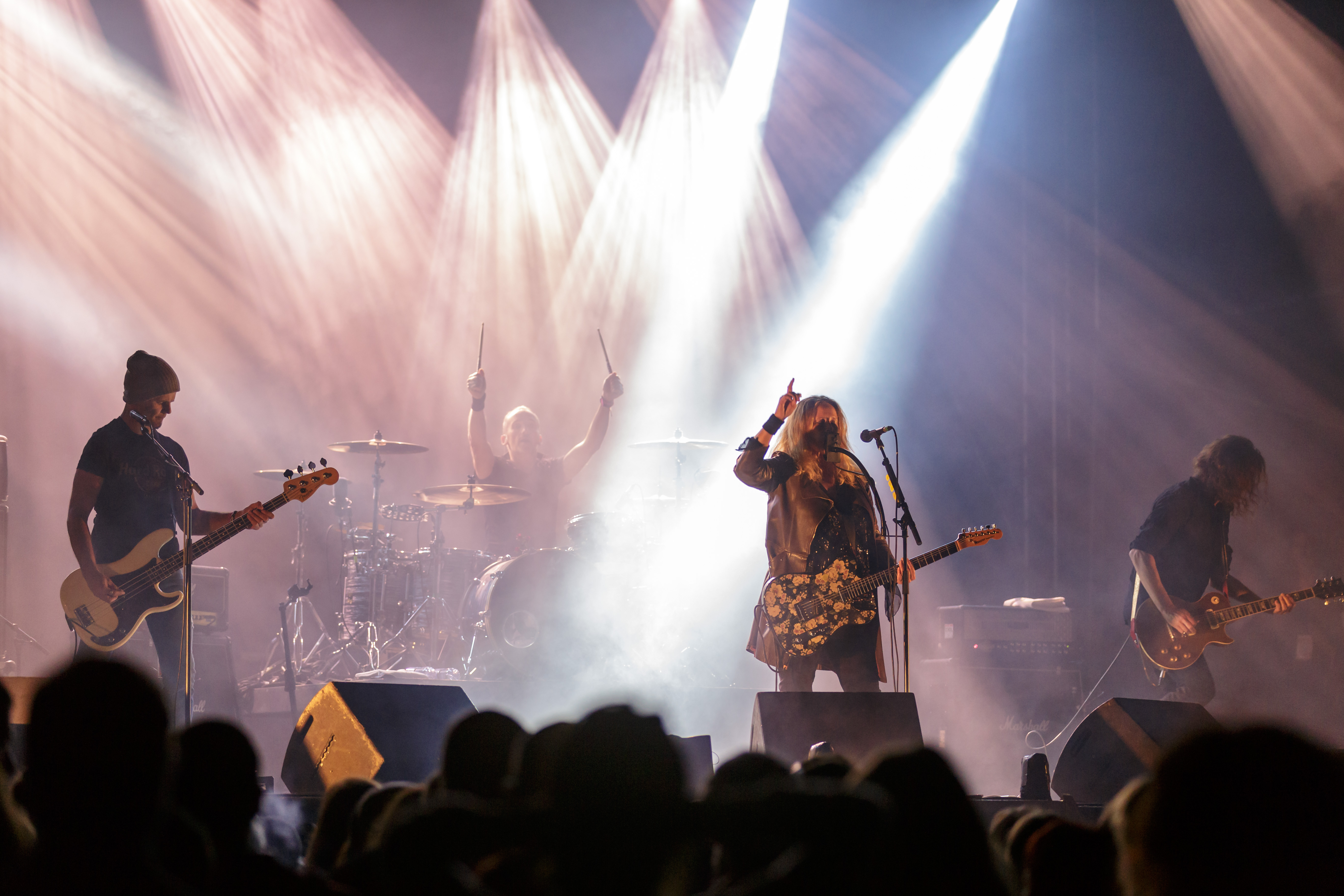 Manu (Emmanuelle Monet) en concert au festival de Buguélès à Penvénan (22) le 30 juillet 2016.